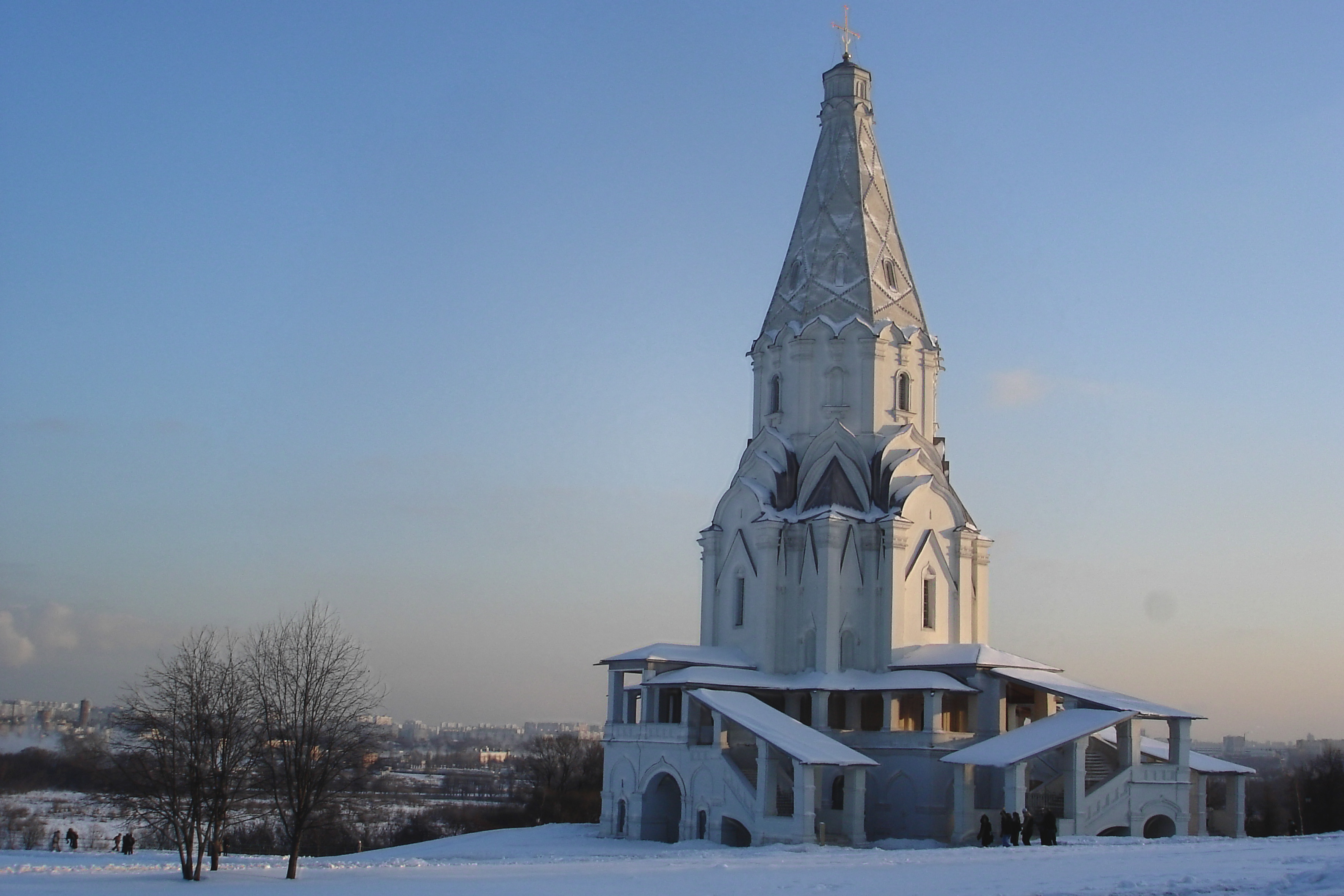 Церковь Вознесения (1532г.)